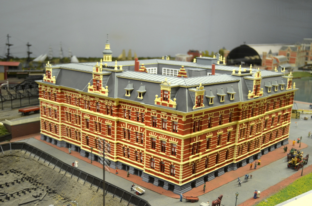 Nederlands Spoorwegmuseum Maquette omgeving Amsterdam Centraal Station - Gebouw Droogbak; 1889. Foto: Erik Swierstra.